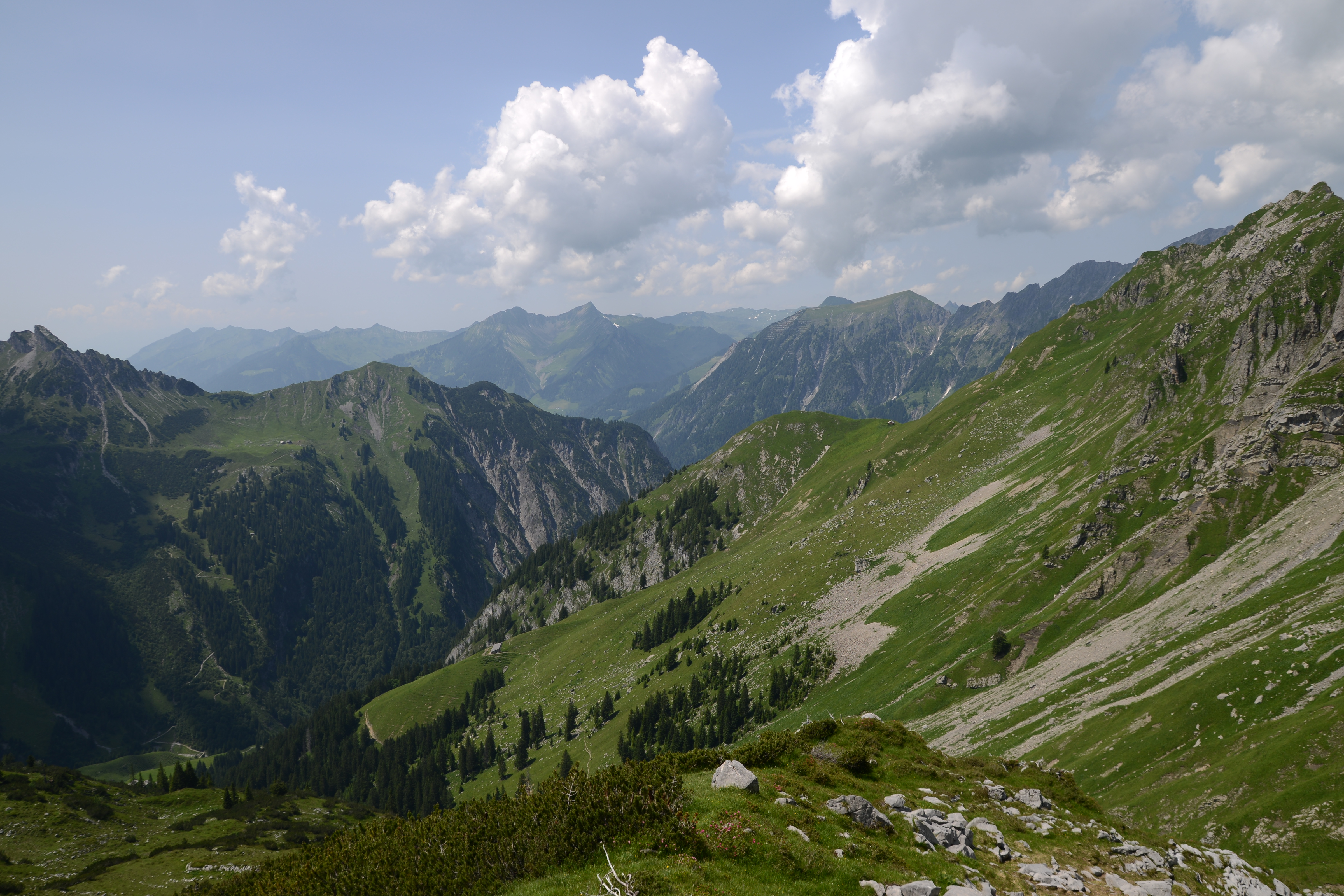 Unter dem Mutterwangjoch (Mutawangjoch) das das Metzgertobel mit dem Gadental verbindet sieht man alle vier Alpen des Auf dem Weg zum Gadentales. Links oben, unter der Wangspitze liegt die Matonaalpe. Auf gleicher Höhe befindet sich visa vis die Stellialpe auf einem Sattel. In der unteren linken Bildmitte ist die Disnerbergalpe und am linken Bildrand erkennt man noch die drei Dächer der Gadneralpe.